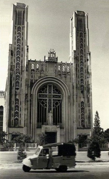 Ancienne cathédrale de Phnom Penh, aujourd'hui détruite.